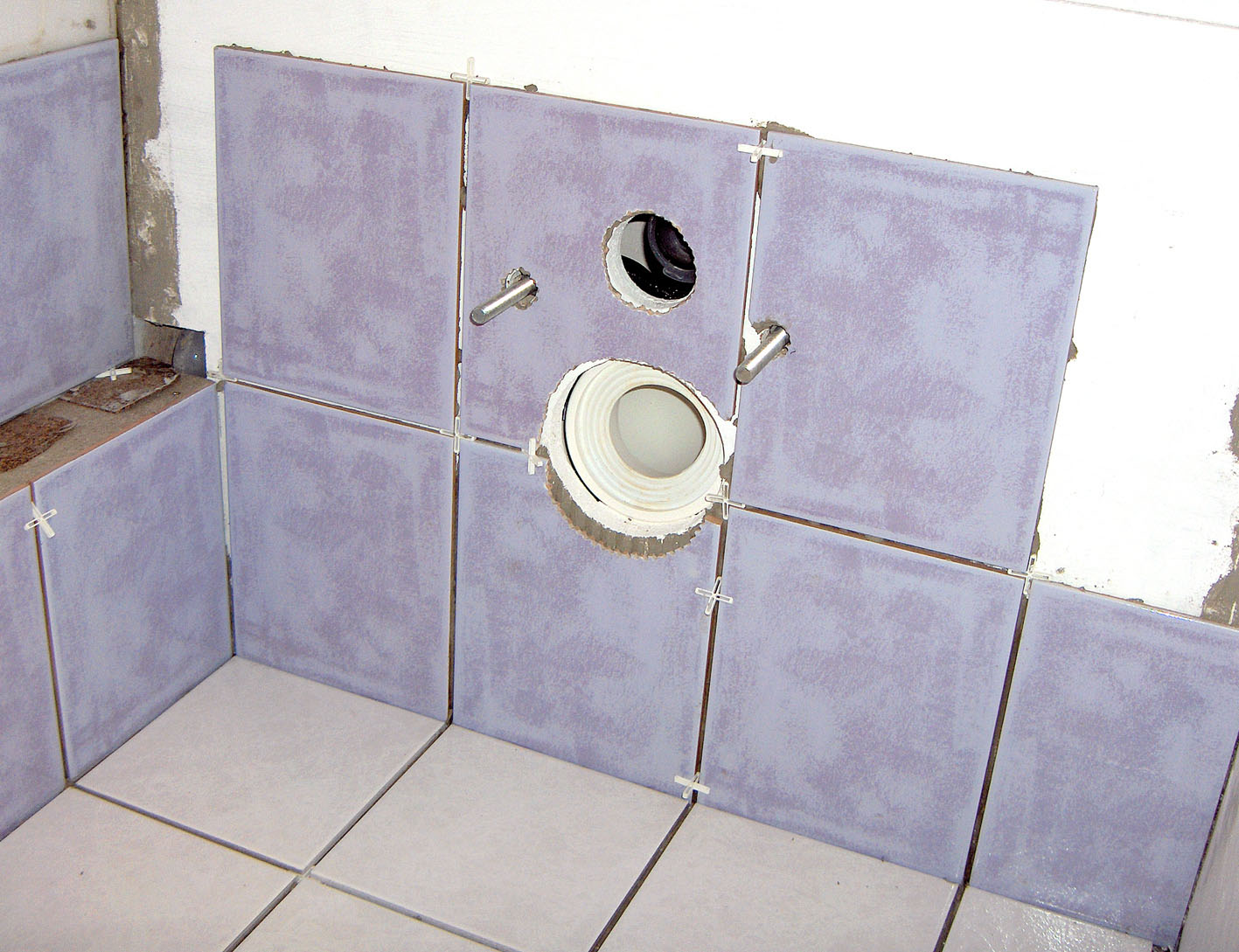 Kacheln, Verfugung.